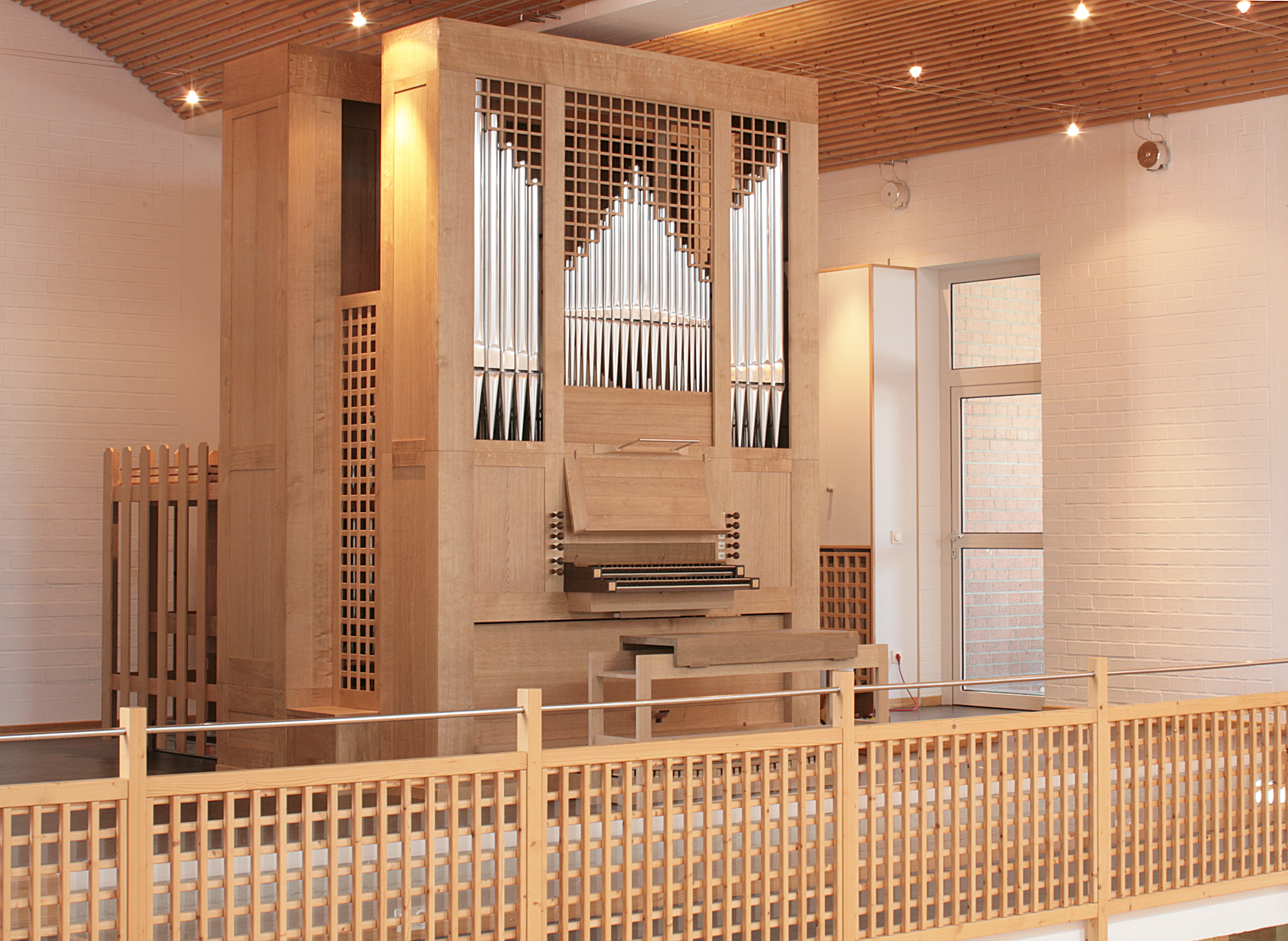 St. Jakobus Aschaffenburg, Bayern, Deutschland